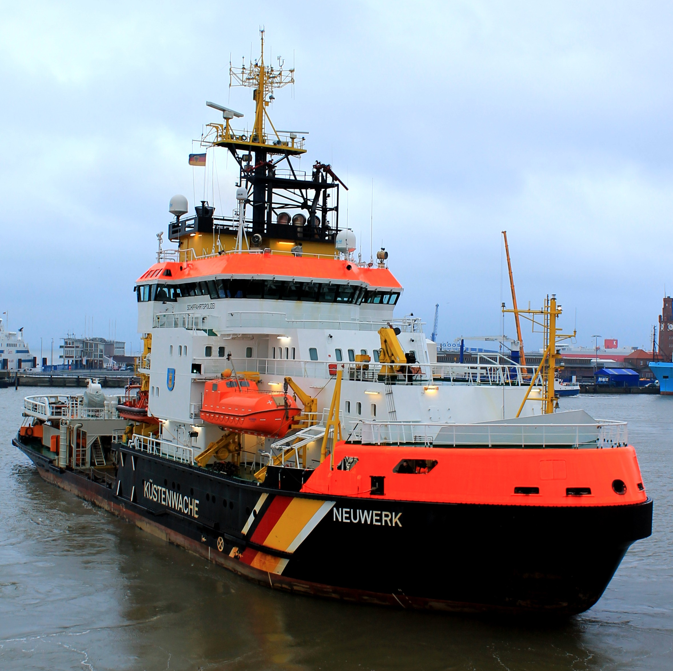 Auslaufende Mehrzweckschiff Neuwerk in Cuxhaven